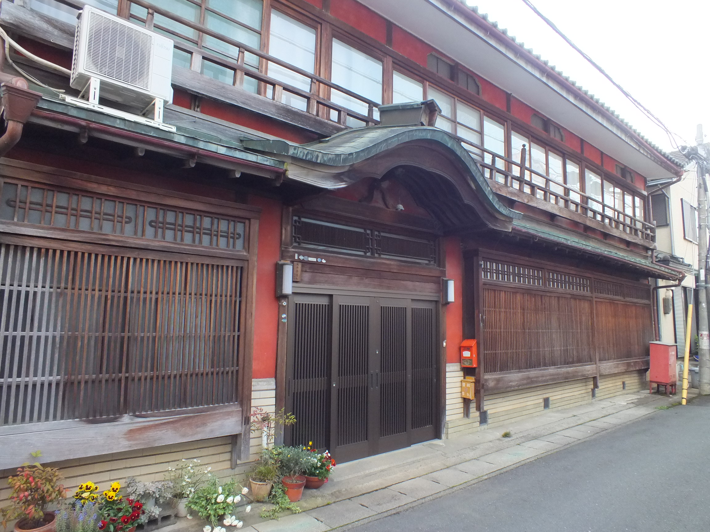 Izaki Yukaku-Fukuchiyama,Kyoto 京都府福知山市 猪崎遊郭跡